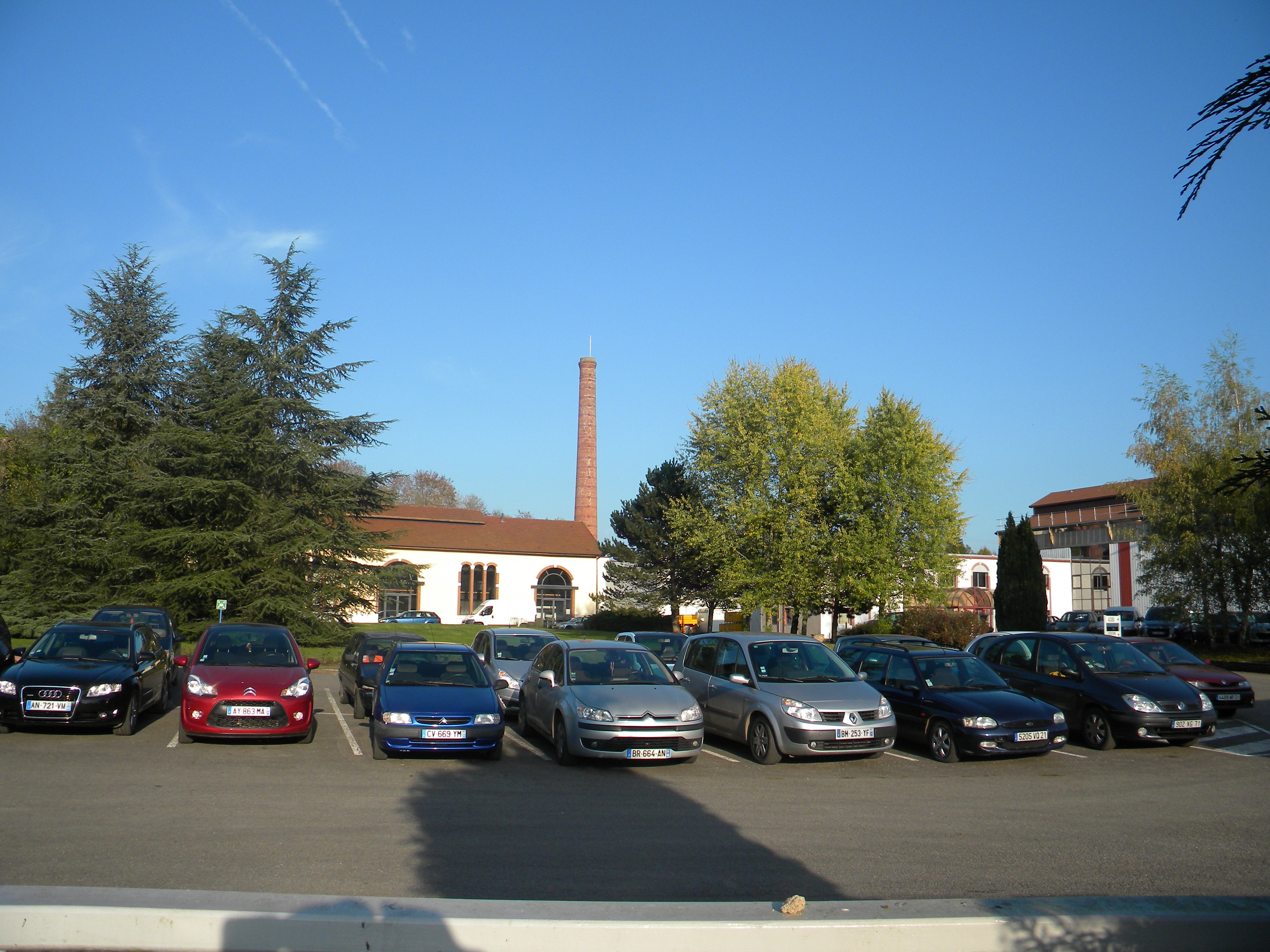 Kuirfornofabriko de Lacanche